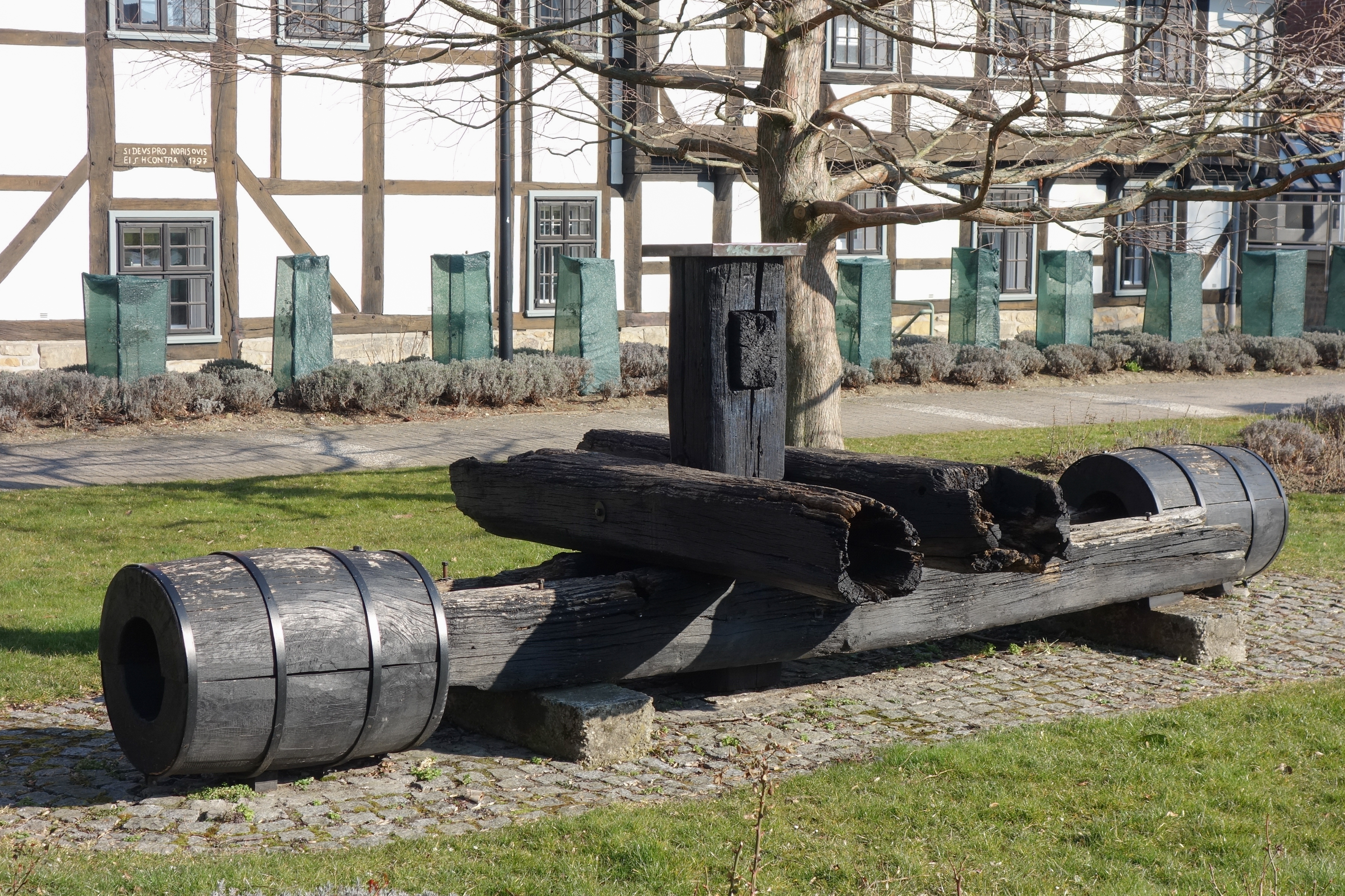 Pumpengestänge des alten Salzbrunnens der Saline Salzliebenhalle im Rosengarten von Salzgitter-Bad